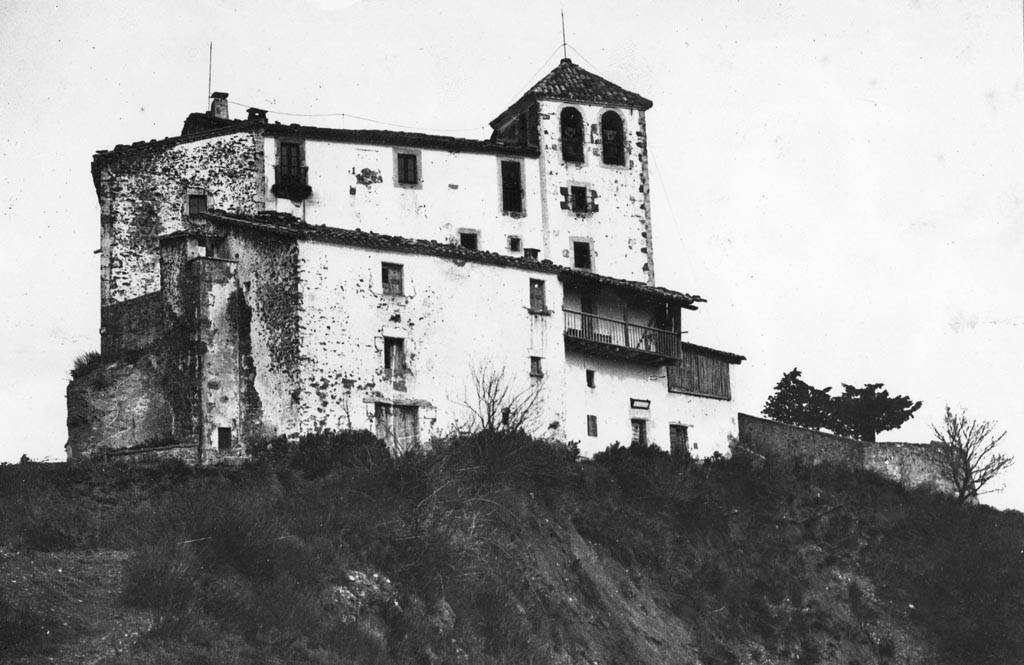 Vista general del Santuari de la Quar. Cèsar August Torras i Ferreri (Entre 1890 i 1923)